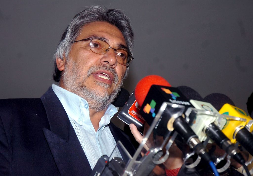 (portuguese) O ex-bispo Fernando Lugo, candidato a presidente da República no Paraguai em 2008